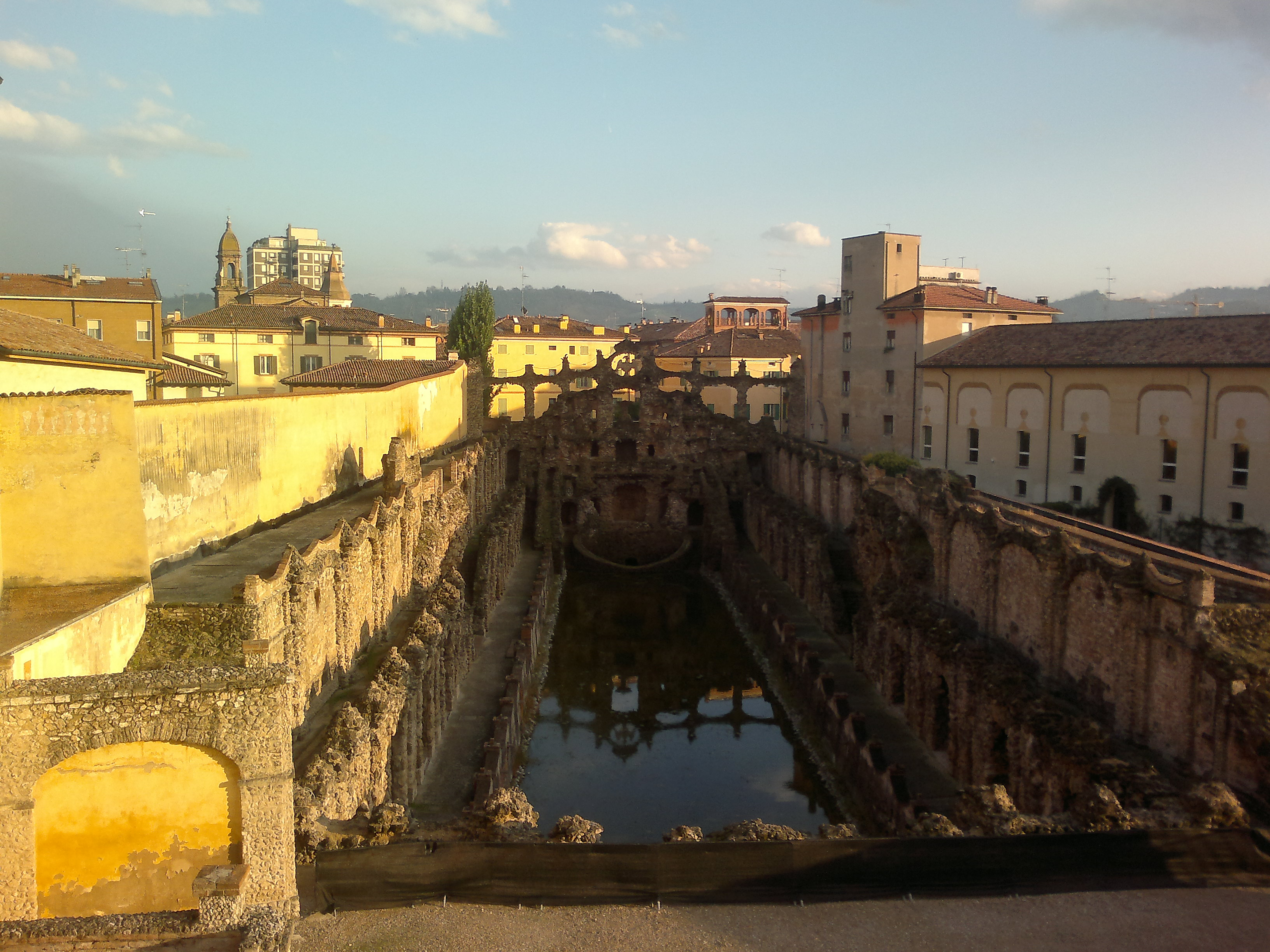 Palazzo Ducale - MIBAC This is a photo of a monument which is part of cultural heritage of Italy.